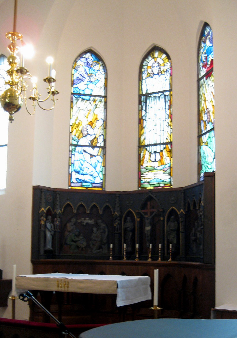 Altar der Gustaf-Adolfskyrkan in Hamburg